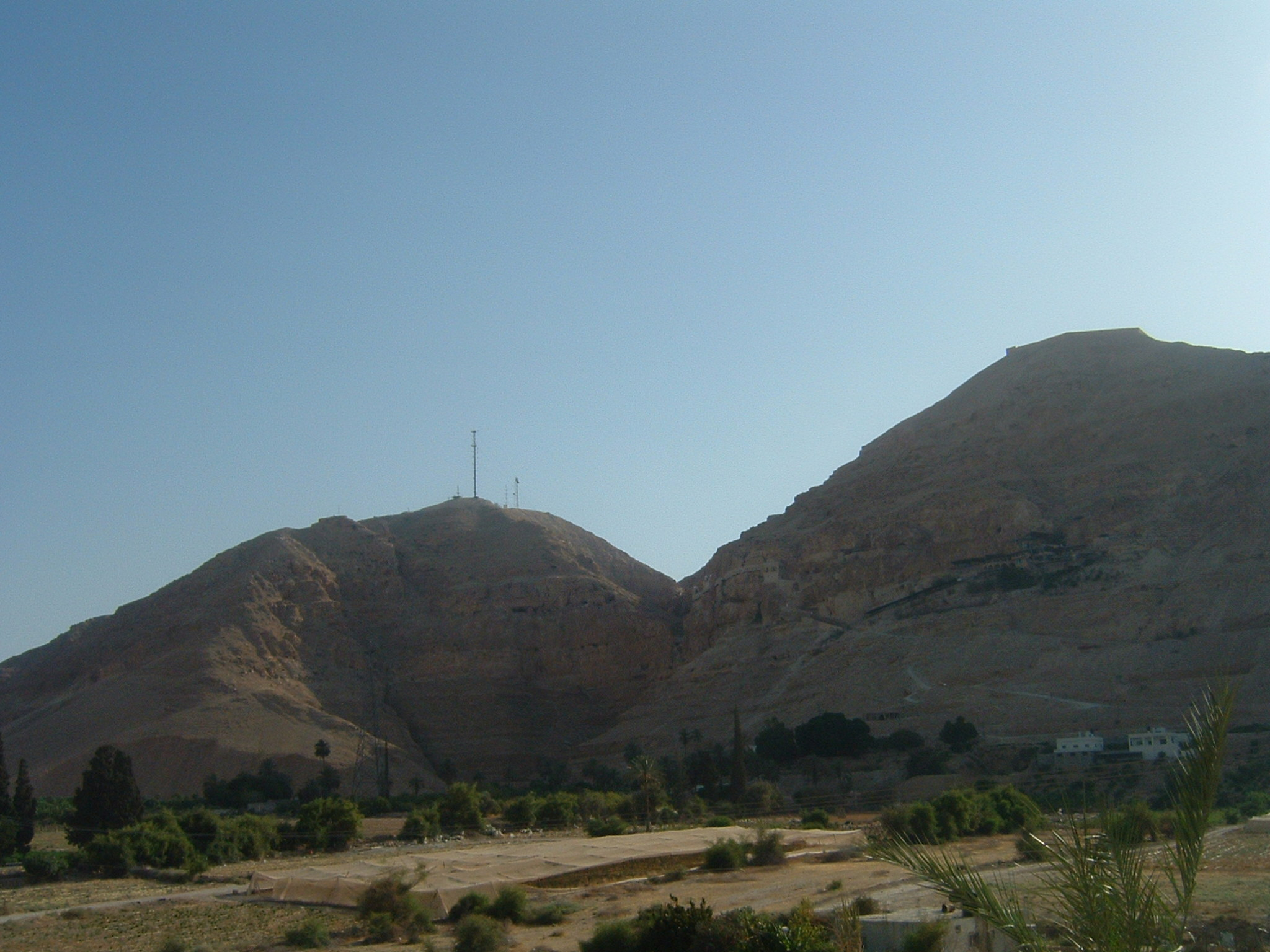 Foto scattata da me il 15 giugno 2008 Monte della quarantena